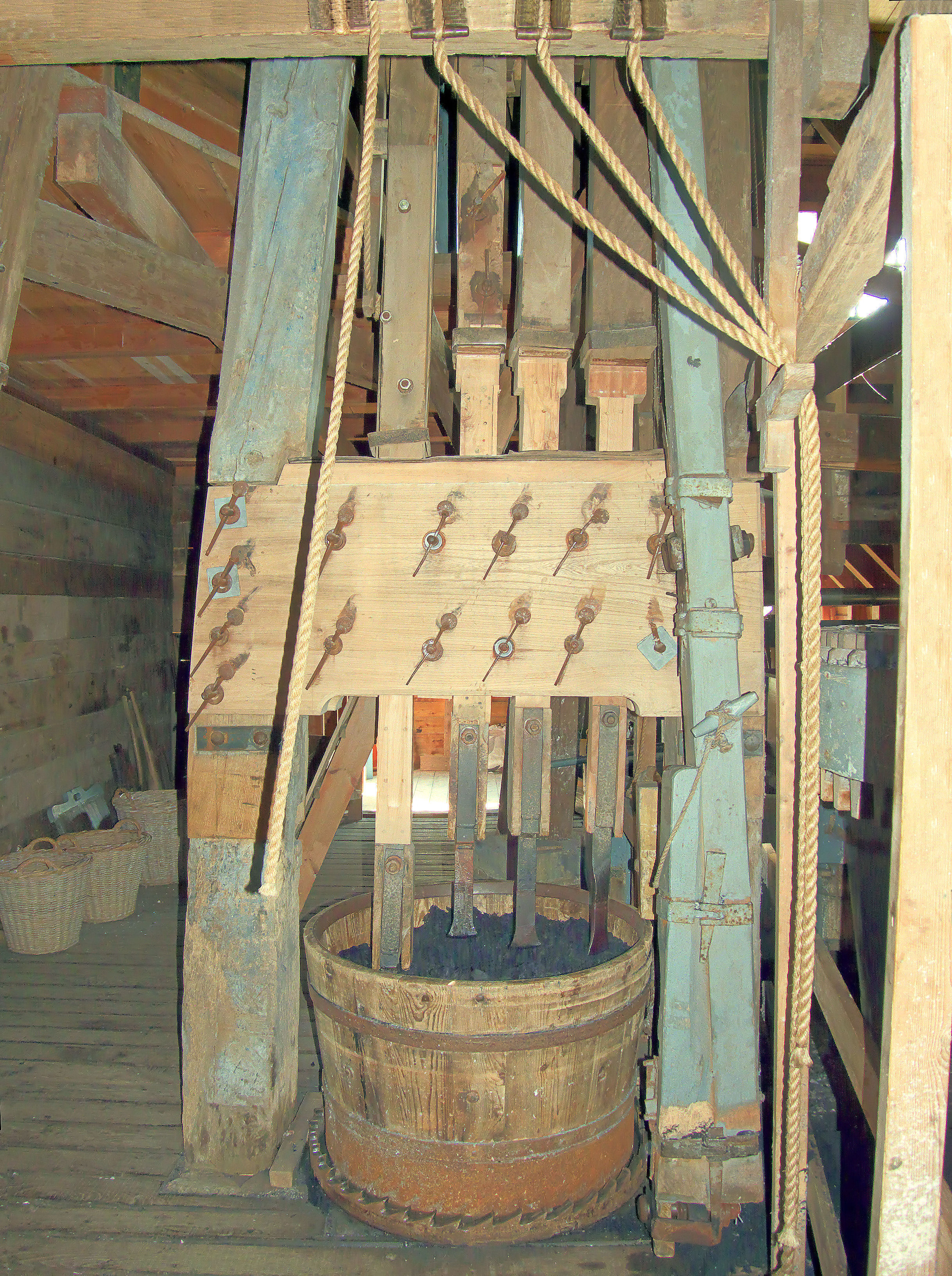 Kapperij van de Schoolmeester